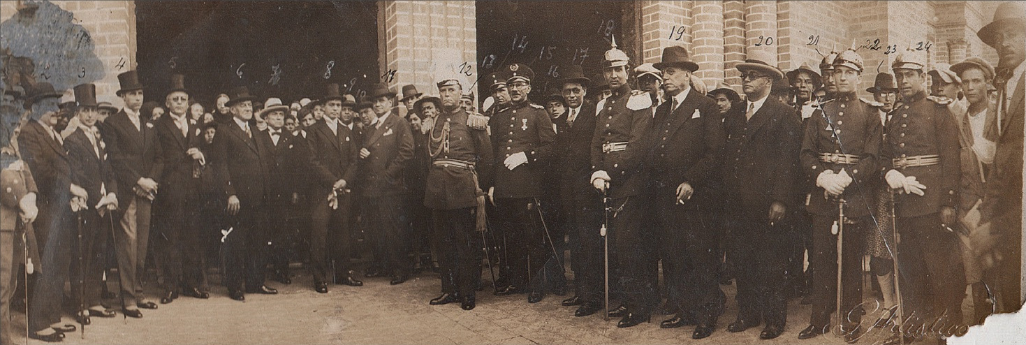 Vista tomada en el atrio de la Catedral de Medellín, a la salida de la Misa Pontifical, el día de su inauguración, el 12 de agosto de 1931. Coronel Guillermo Gomez. Don Luis Avella Nouvrac - Agente del Consulado Francés. Mr. Raymond Phelan - 2do vicecónsul de EEUU. Mr. Charles C. Hall - vicecónsul de EEUU. Don Ricardo Greiffenstein - Cónsul de Alemania Dr. Camilo C. Restrepo - ex gobernador de Antioquia. Don Ramon Soler Maymó - Vicecónsul de España. Dr. Jorge Restrepo Hoyos - Secretario de gobierno encargado de la gobernación. Don Ricardo Lalinde - vicepresidente soc. de mejoras públicas. Dr. Fernando Estrada - presidente soc. de mejoras públicas. Dr. Alfonso Castro. General Marco A. Álzate. Coronel Francisco Duque R. Capitan Laureano Forero - Capitan de la policía departamental. Coronel Rito A. Neira. Don Ignasio Cano - Subsecretario de gobierno. Dr. Julio Cesar García - Director General de educación pública. Mayor Emiliano Posada. Dr. Julio E. Botero - ex gobernador de Antioquia. Don Marco Arango - gerente del banco de Bogotá. Mayor Demetrio Bernal. Teniente Ernesto Chacón del C. Ayudante del comando. Dr. Baudillo Zuluaga - director departamental de lazaretos. Teniente NN